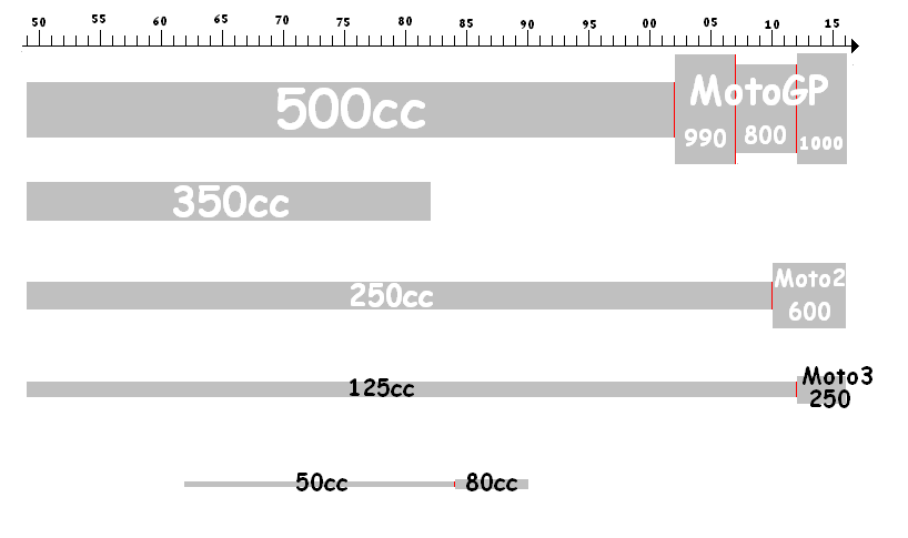 Wykres klas składowych MMŚ na przestrzeni lat